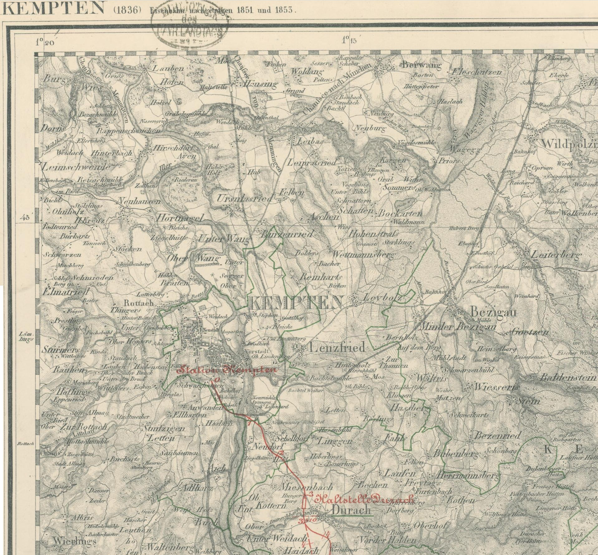 Topographischer Atlas vom Königreiche Baiern, Blatt Kempten (1836, Eisenbahn nachgetragen 1851 und 1853. Maßstab 1:50.000)